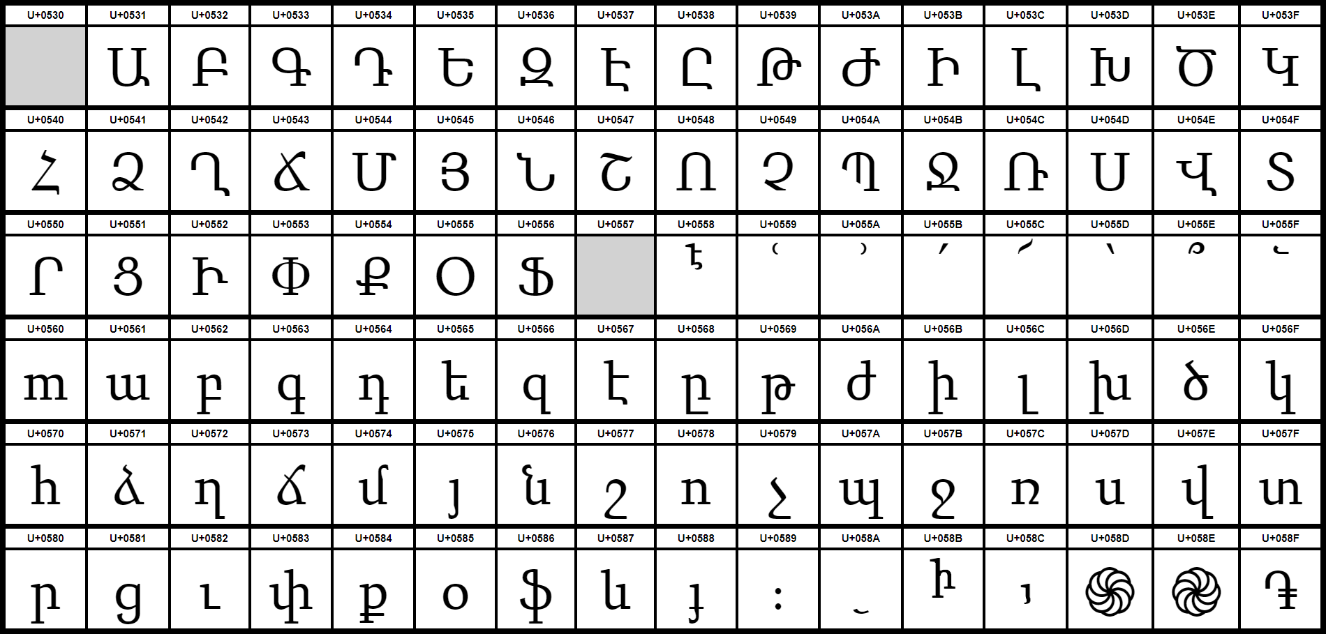 Grafiktafel für den Unicodeblock Armenisch. Schraffierte Felder sind unbesetzte Codepoints.